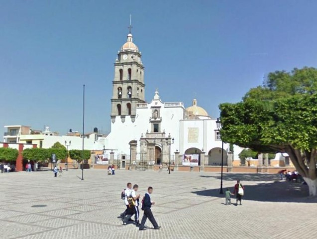 Parroquia de San Francisco de Asis en Comonfort, Guanajuato México